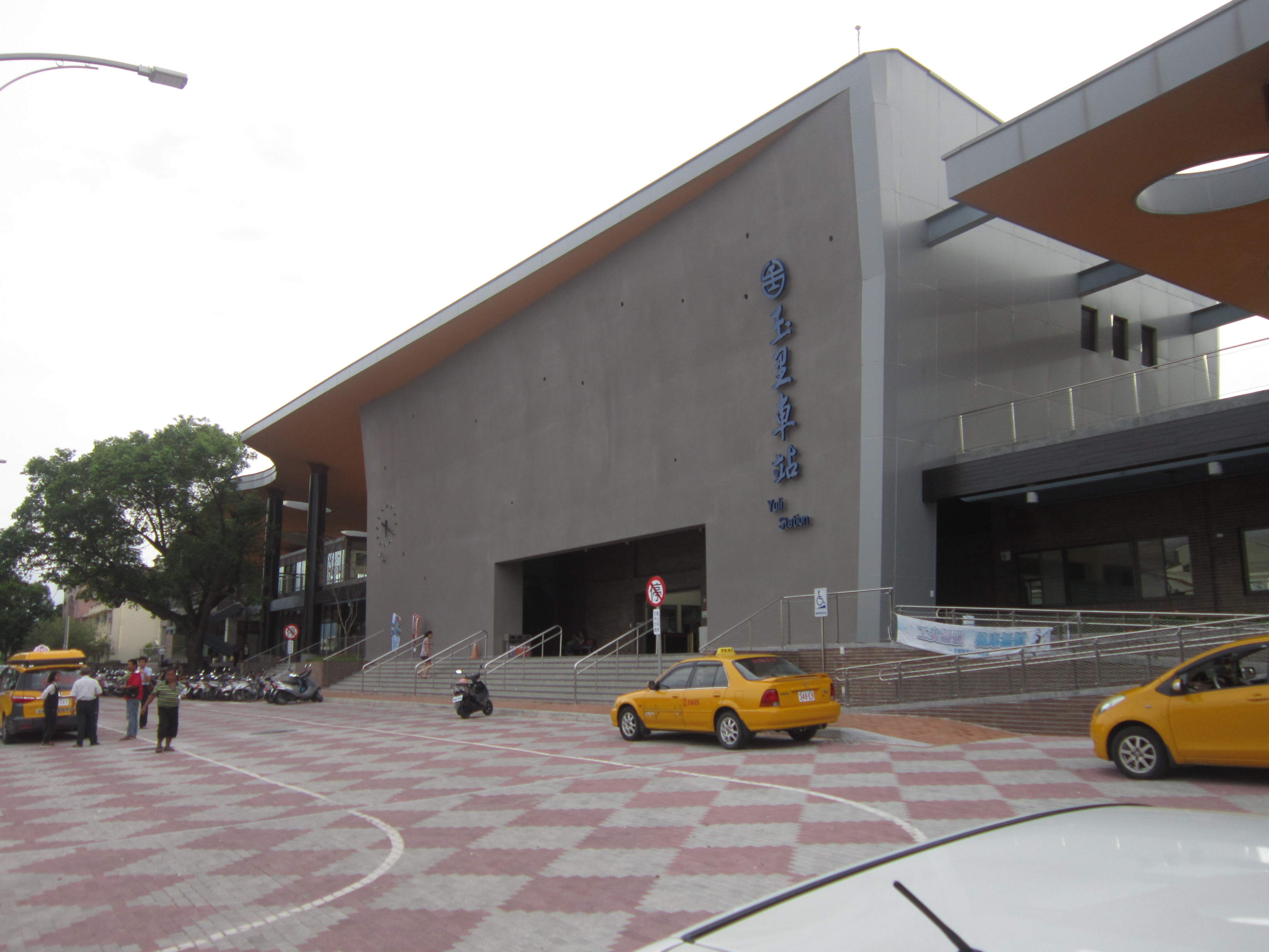 2016年站體改造完成後的新玉里車站一景(一)